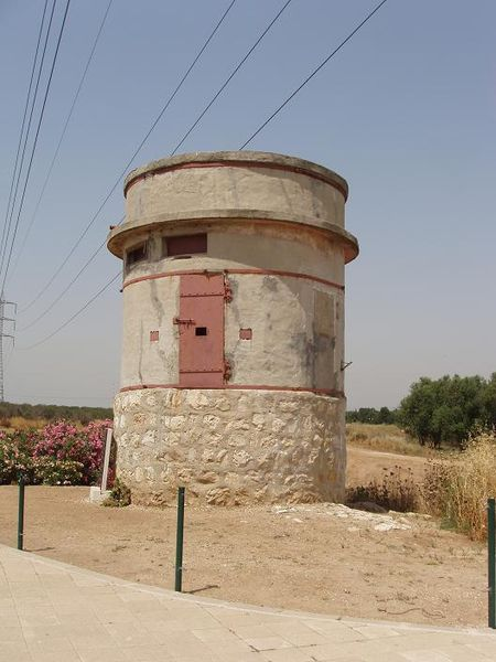 פילבוקס ליד גשר עד הלום. צילם דוד שי